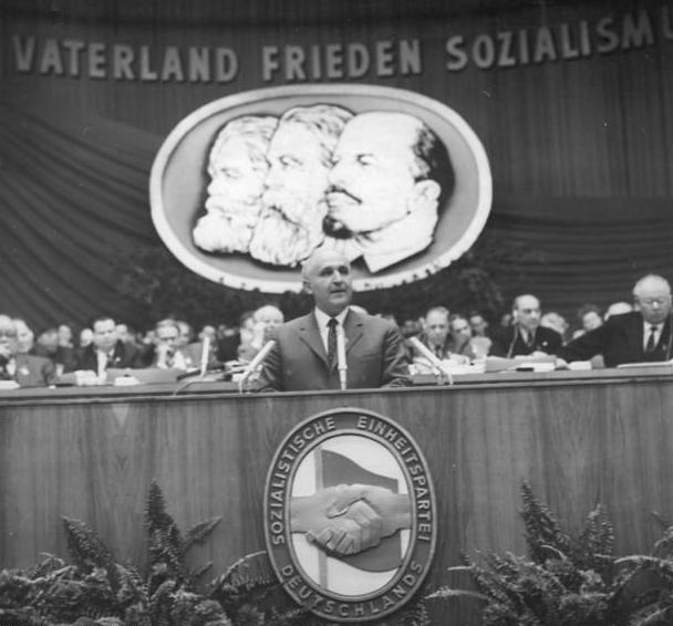 Zentralbild Kollektiv Me-Qu 18.1.1963 VI. Parteitag der SED vom 15.-21.1.1963 in der Werner-Seelenbinder-Halle in Berlin (4.Tag). UBz. Der Erste Sekretär des ZK der Bulgarischen Kommunistischen Partei und Vorsitzende des Ministerrates der Volksrepublik Bulgarien, Todor Chinkow, bei seiner Grußansprache. (Schaar)